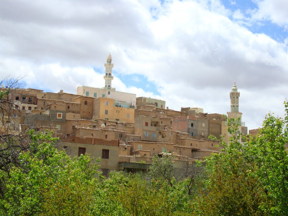 Village de Menâa